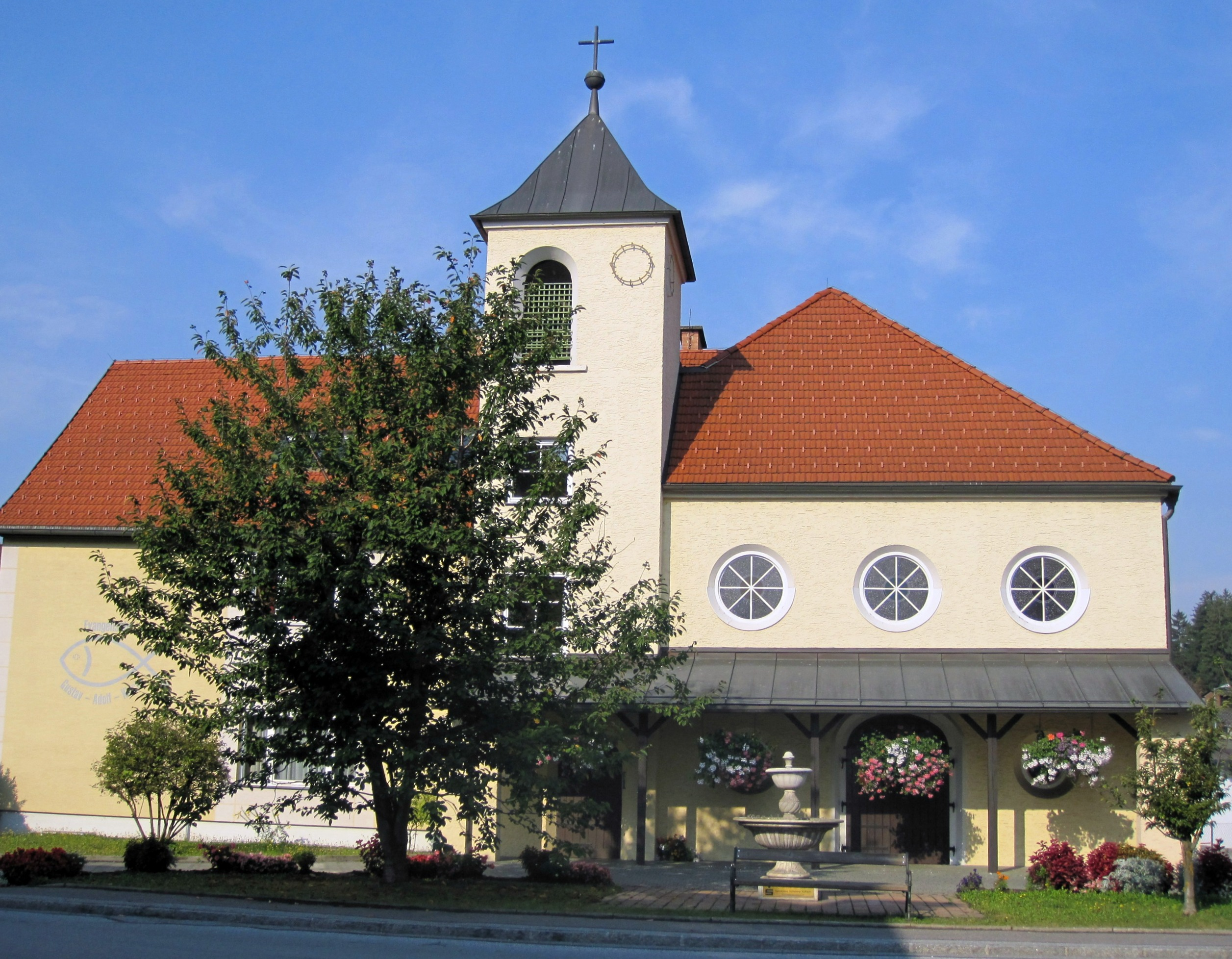 Evang. Pfarrkirche A.B., Gustav Adolf- Kirche